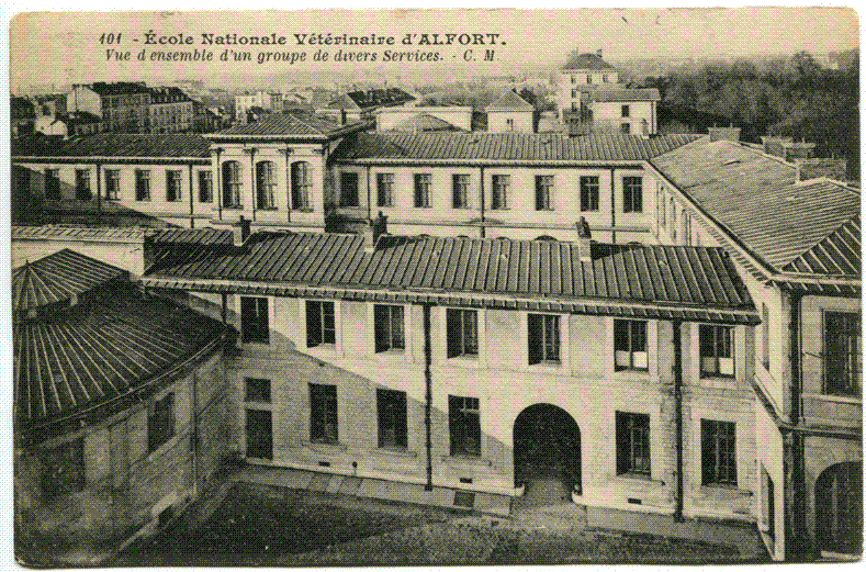 Carte postale ancienne éditée par CM, n°101 : École nationale vétérinaire d'ALFORT : Vue d'ensemble d'un groupe de divers services. Vue d'ensemble de bâtiments de l'ENVA